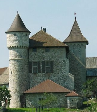 Chateau de Rossy